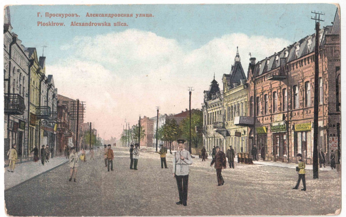 Поштова листівка початку XX століття "м. Проскурів Подільської губернії, Олександрівська вулиця"